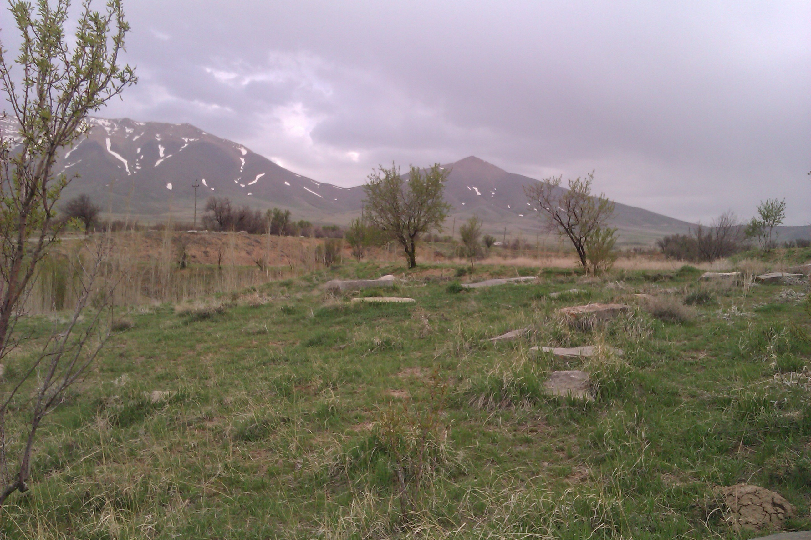 این سنگ نوشته ها مربوط به ساکنین قدیم روستای فرج آباد (ارامنه) میباشد که سالها پیش از این منطقه مهاجرت نموده و برخی از انان ساکن مجیدیه تهران می باشن